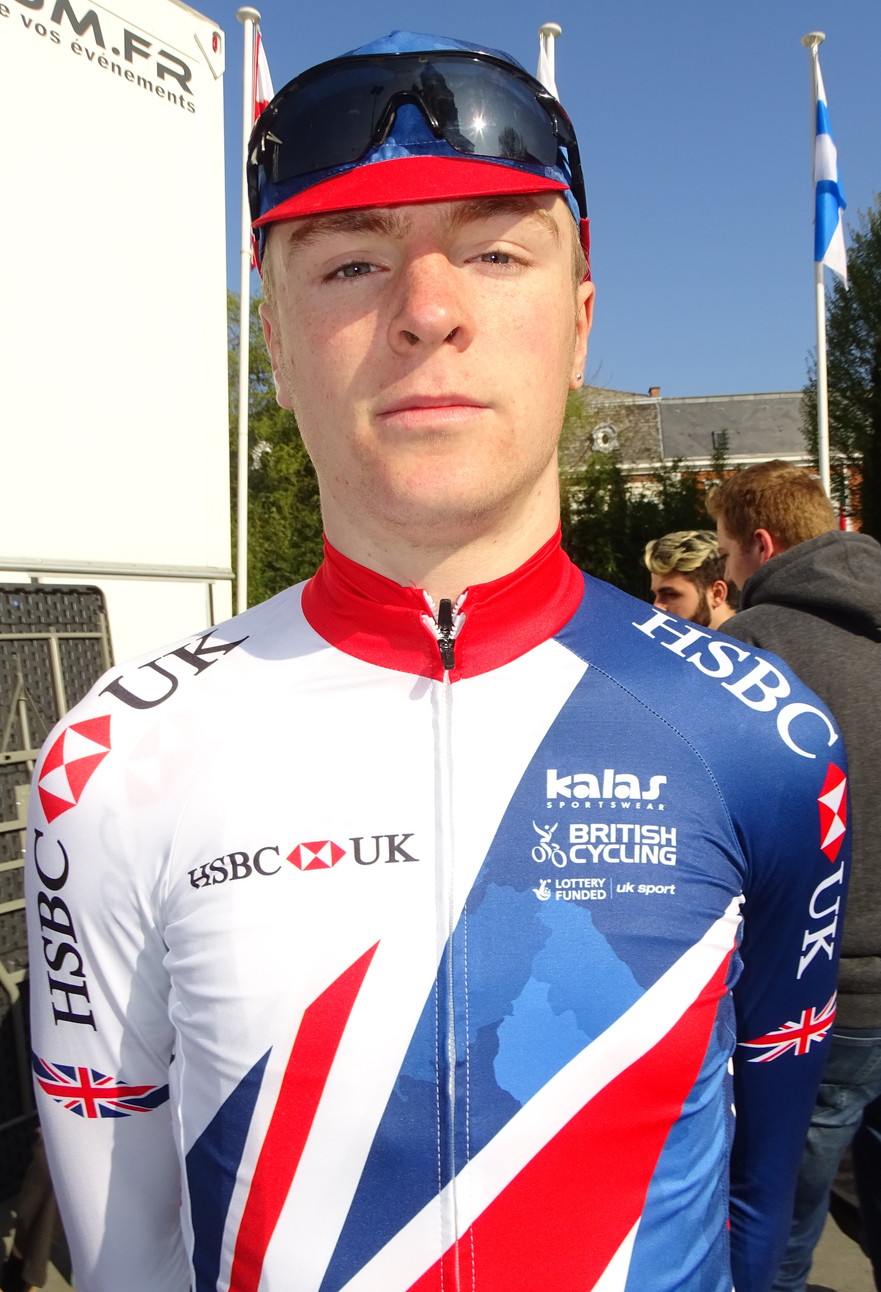 Reportage réalisé le dimanche 9 avril à l'occasion du départ du Paris-Roubaix juniors 2017 à Saint-Amand-les-Eaux, France.